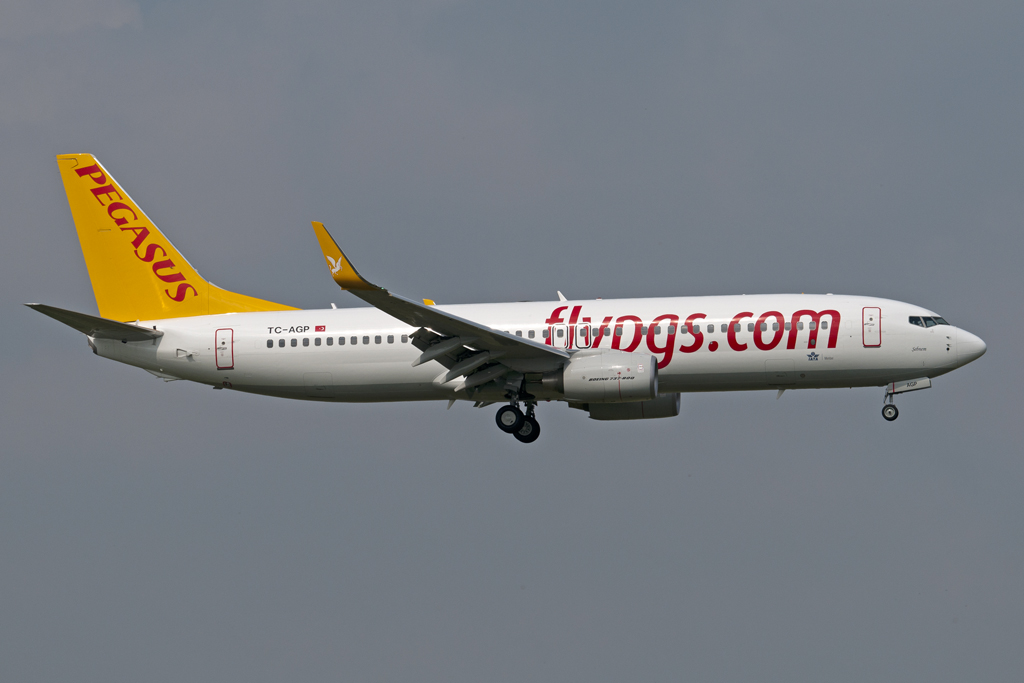 Boeing 737-8Q8 Amsterdam schiphol [AMS / EHAM] 17-04-2011